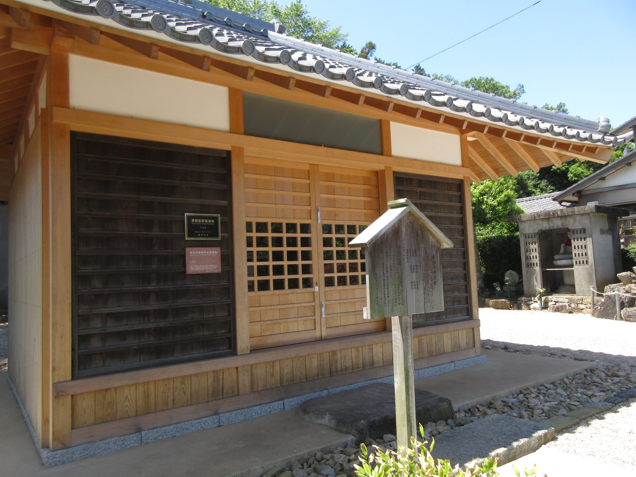 十王堂（岡崎市藤川町）